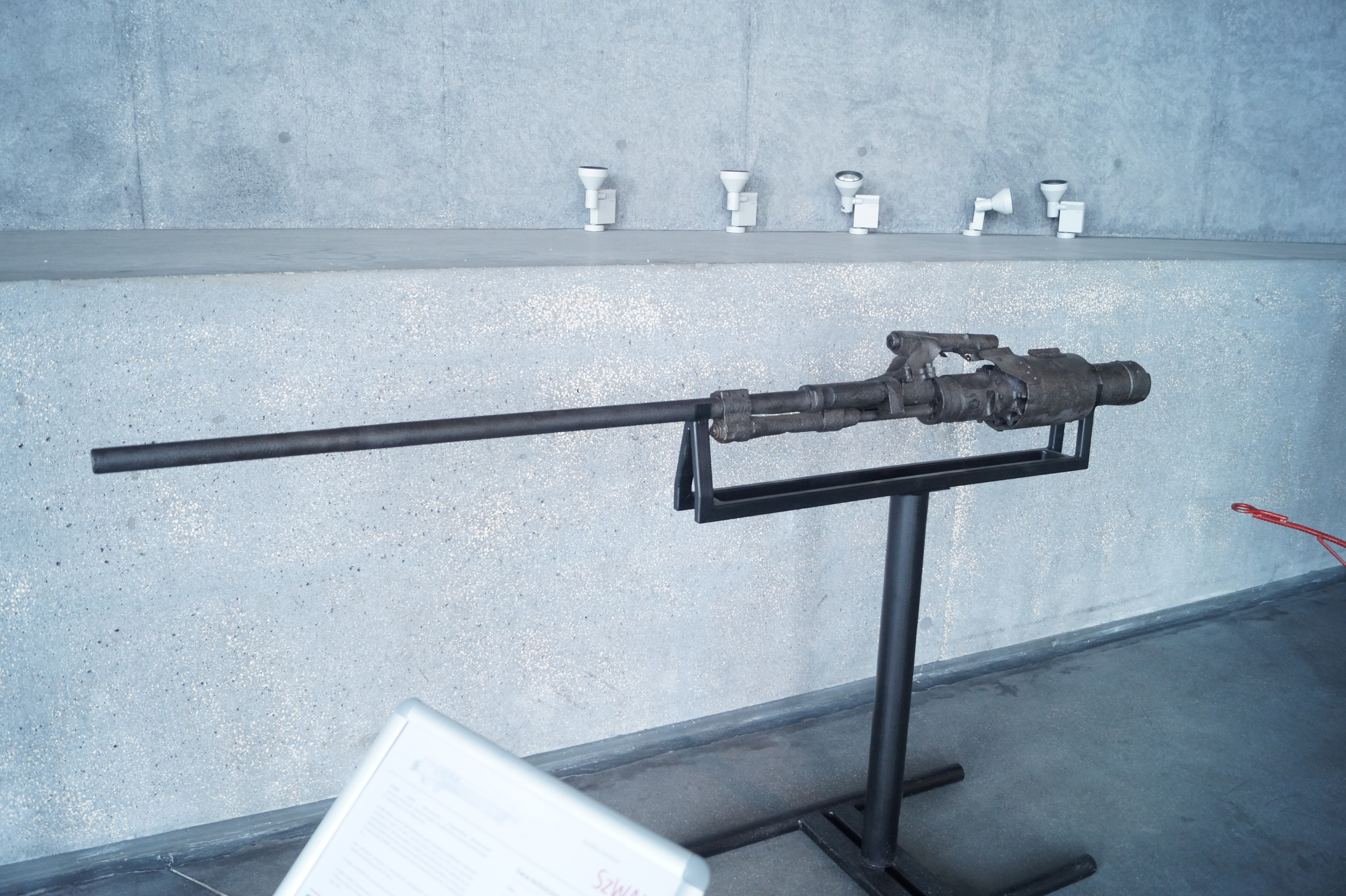 This photo was taken during Automotive Wikiexpedition 2016 set up by Wikimedia Polska Association. You can see all photographs in category Wikiekspedycja motoryzacyjna 2016. English | Polski | +/− Działko lotnicze SzWAK 20 mm w Muzeum Lotnictwa Polskiego w Krakowie